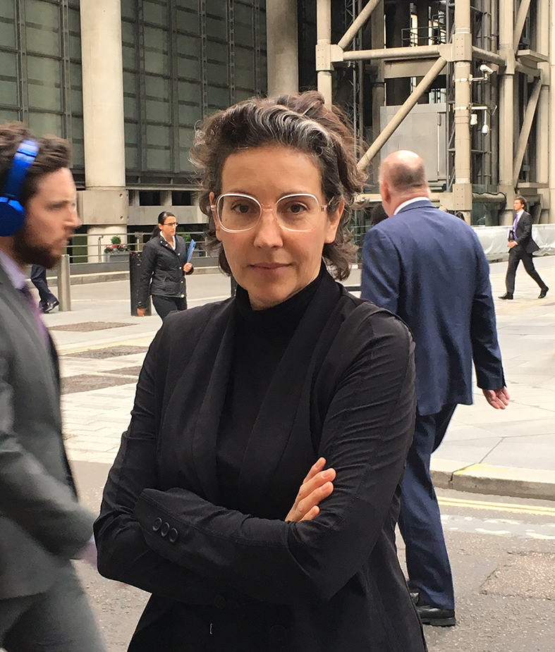 Portraitfoto von Brigitte Franzen, Straßenszene